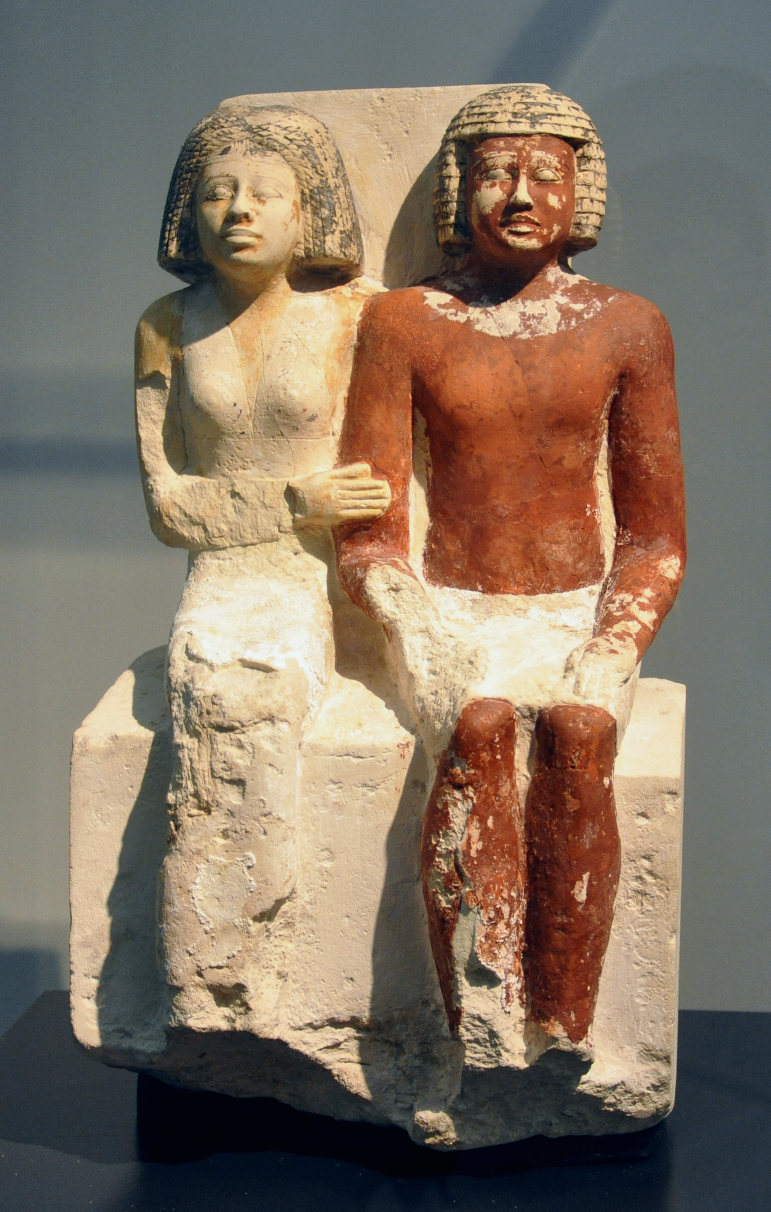 Figurenpaar, Ägypten, Sakkara oder Bashur, Altes Reich, Fünfte Dynastie, um 2400 v. Chr.; Kalkstein; Museum Rietberg, Zürich; Geschenk Eduard von der Heydt; Inv. Nr. RAG 1